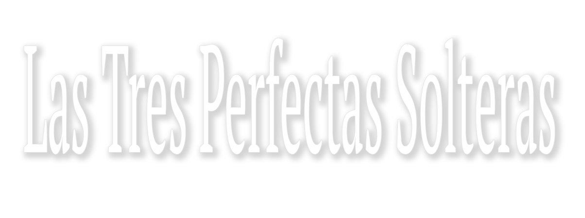 Las tres perfectas solteras